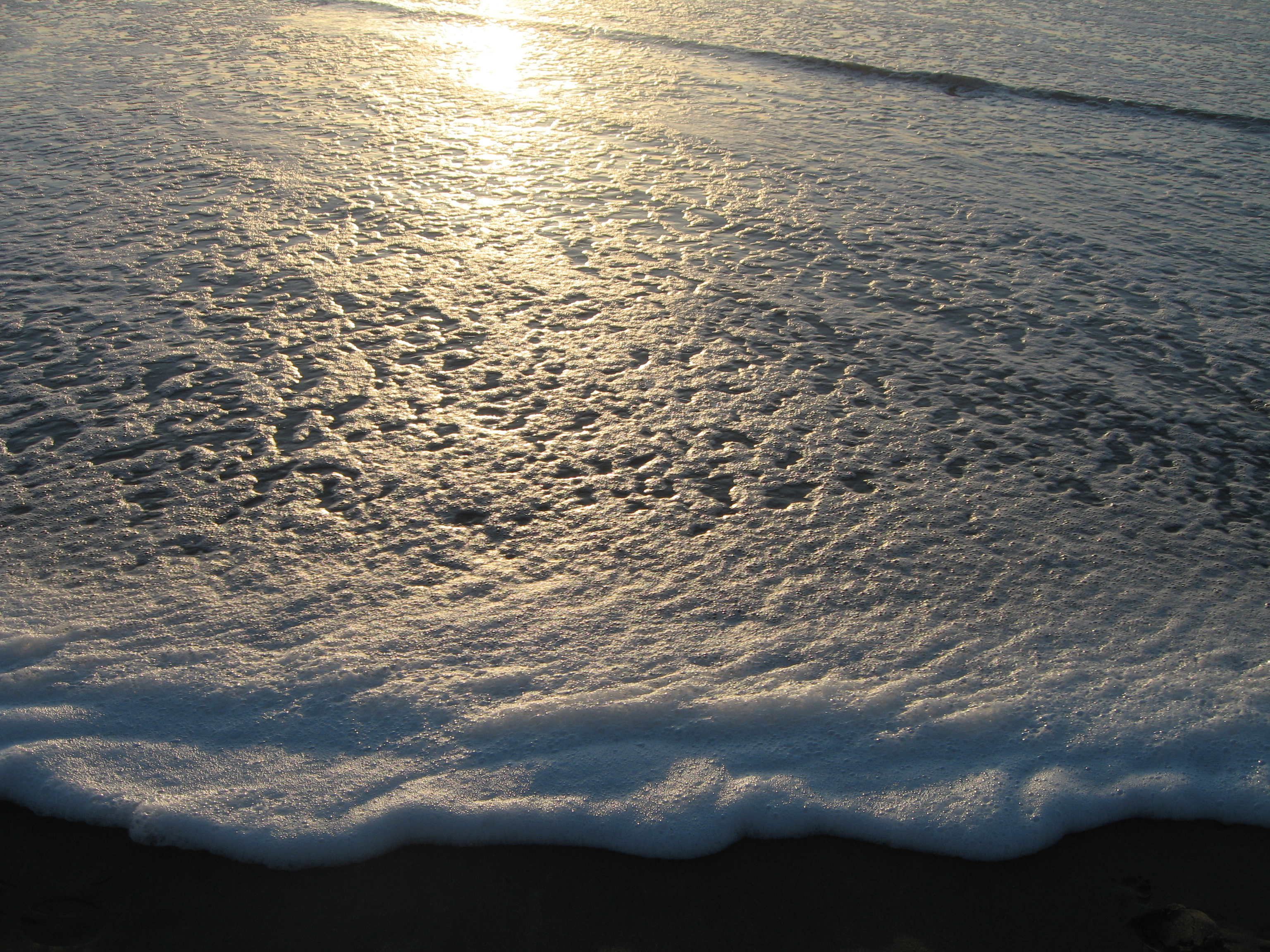 San Francisco